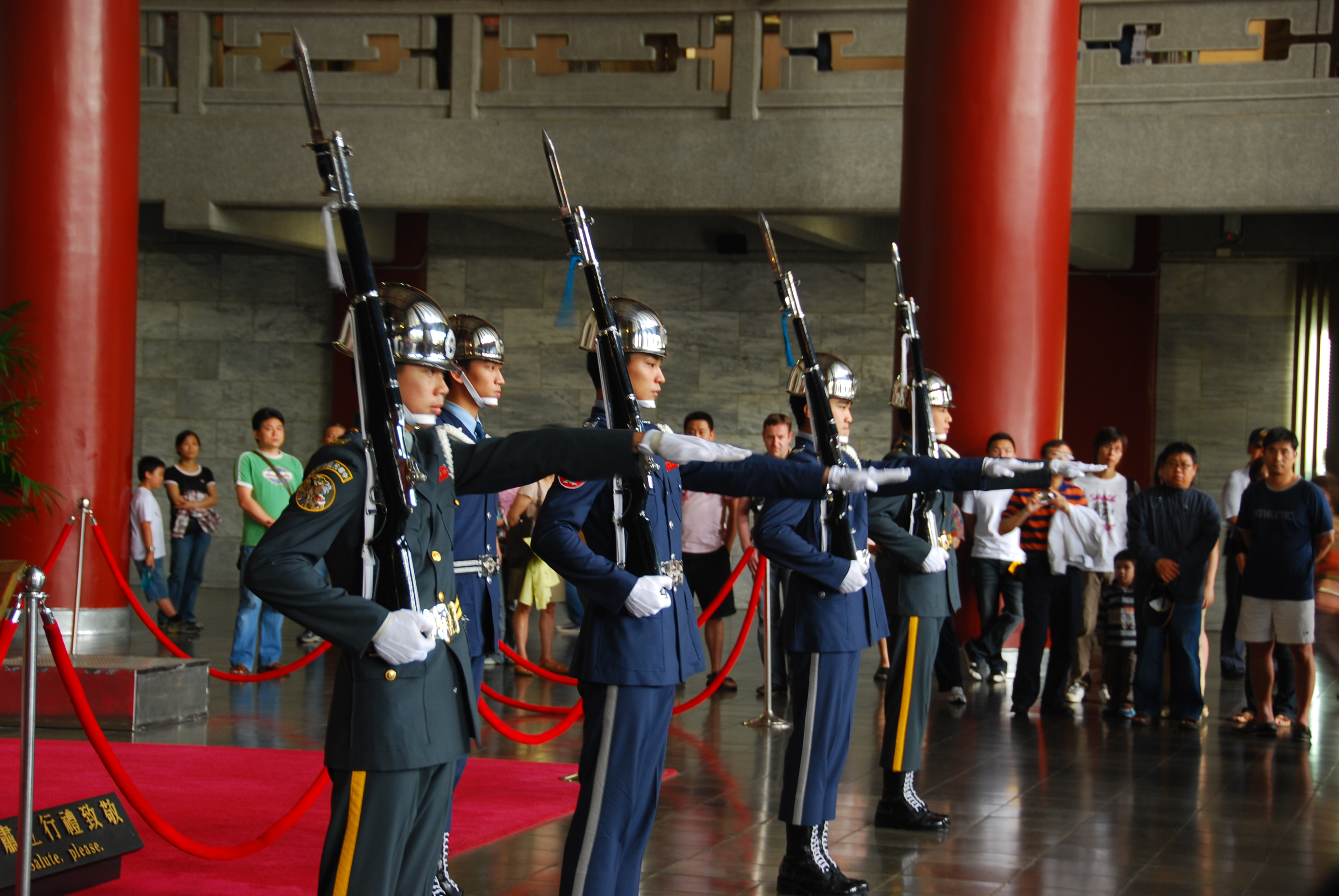 臺北市國立國父紀念館1樓大廳，中華民國陸軍儀隊與空軍儀隊交接。